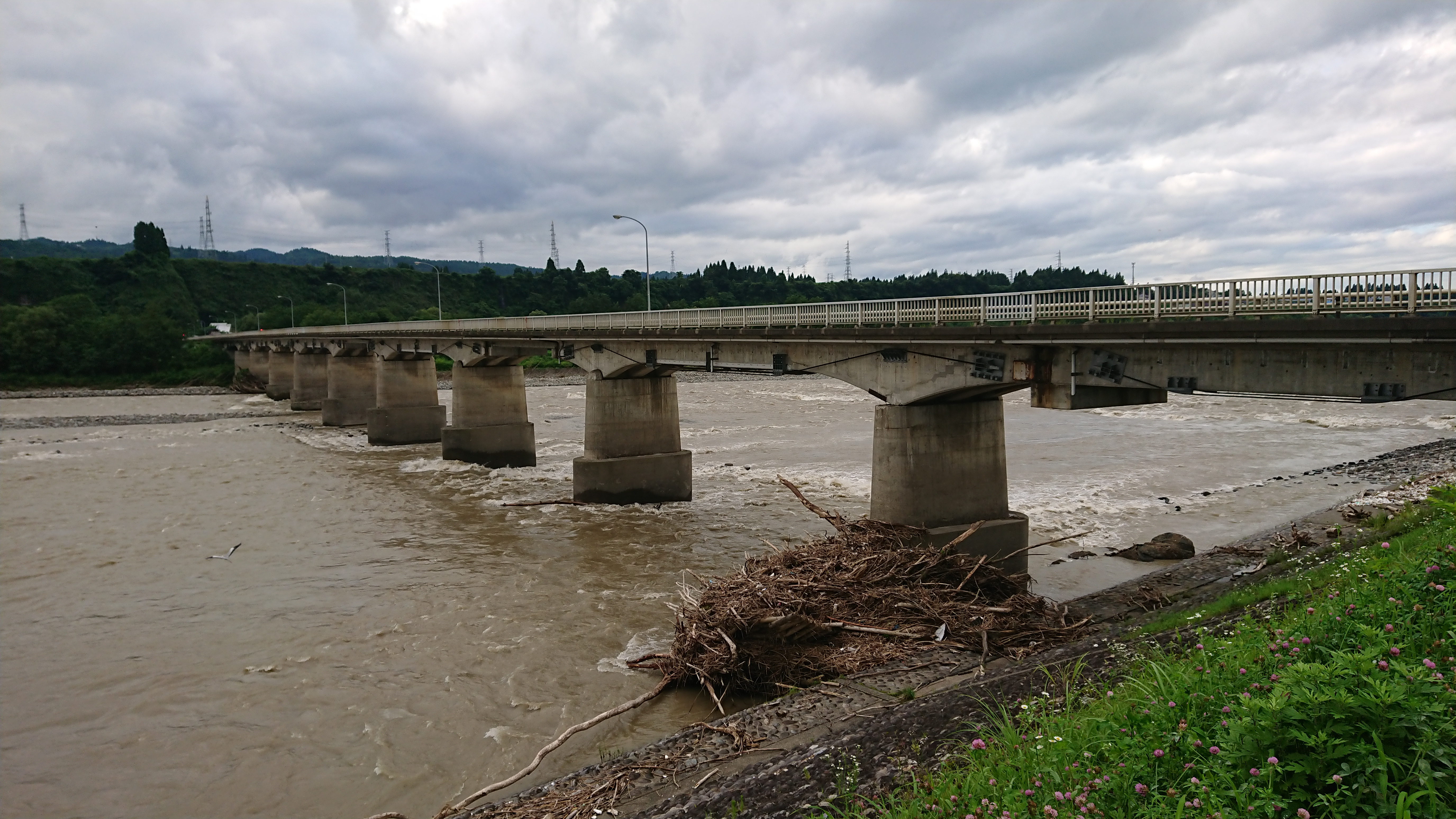 十日町橋を上流右岸側の堤防より撮影。 新潟県十日町市、2020年7月30日。